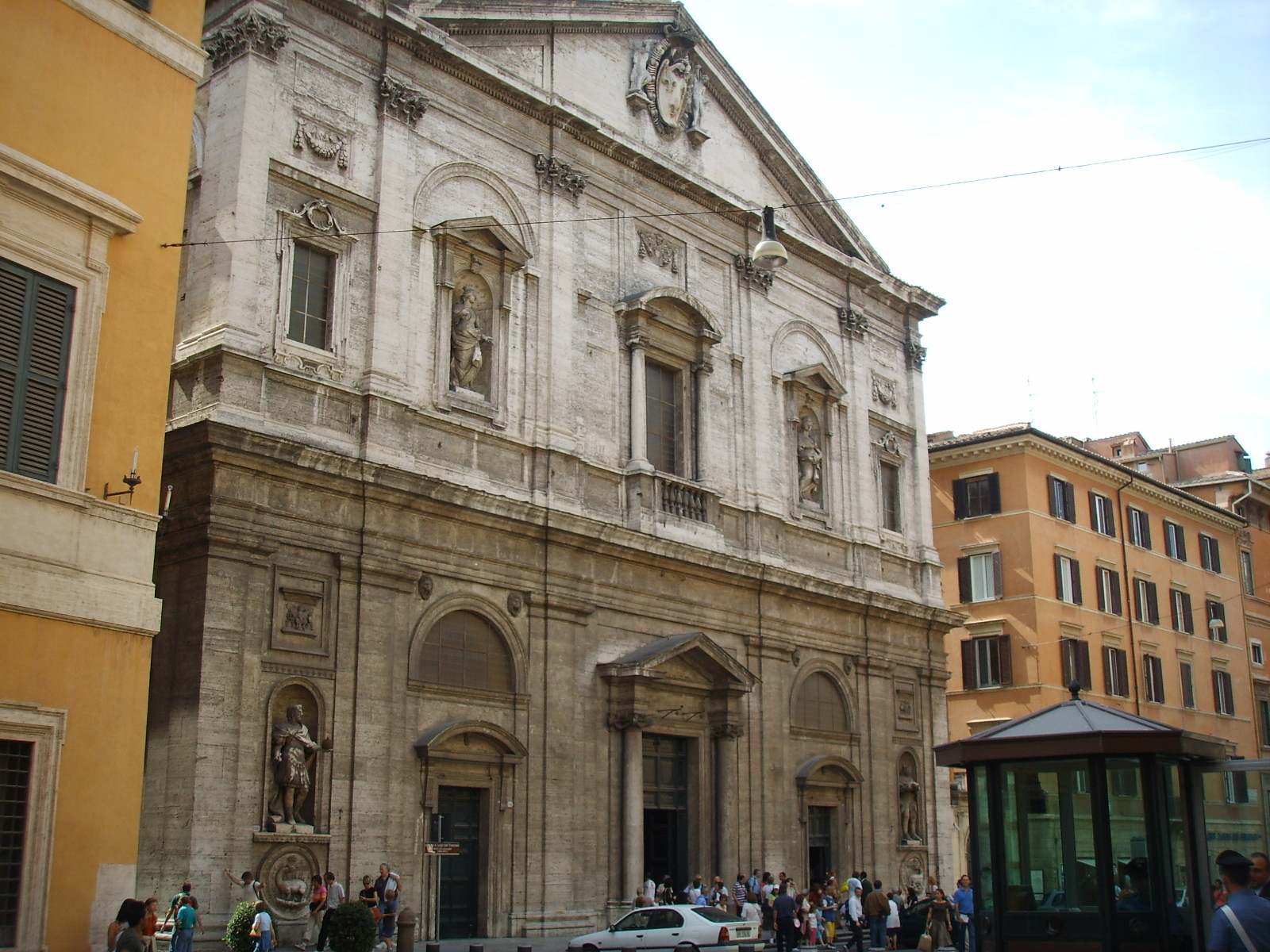 San Luigi dei Francesi façade, otside view, in Rome, Italy